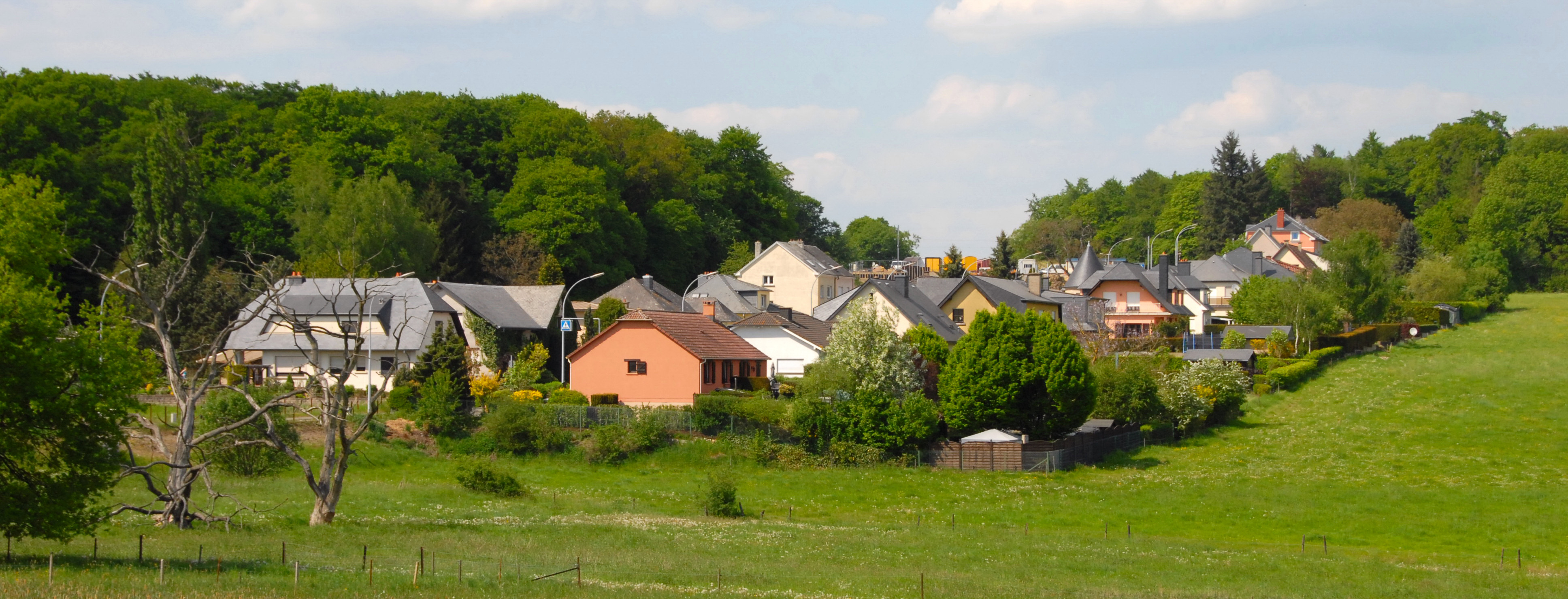 Leudelange-Gare (Luxembourg)